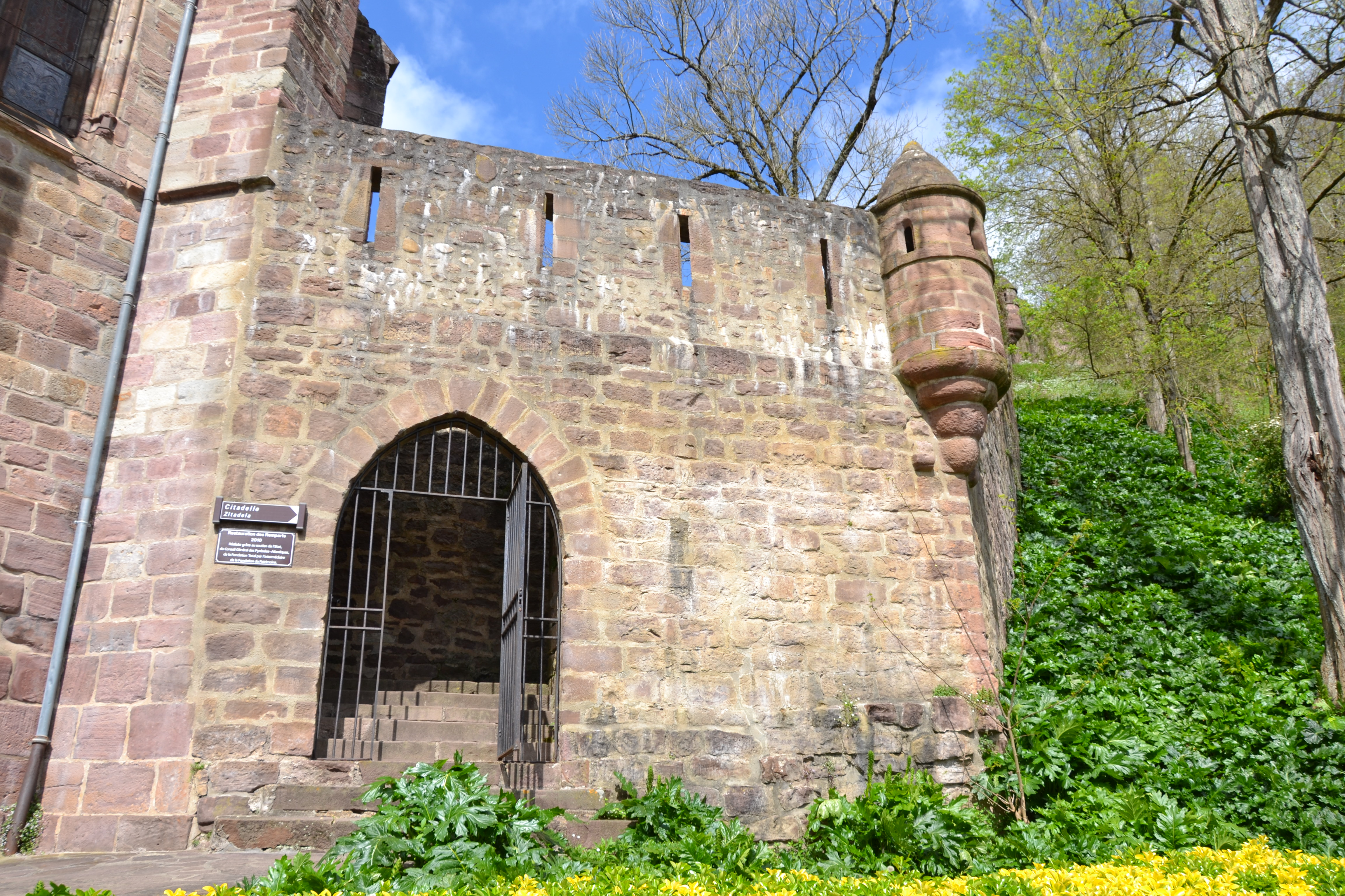 Rempart de Saint Jean Pied de Port .